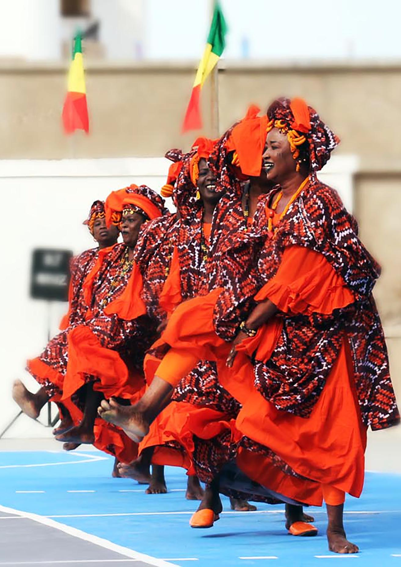 "Ndaw rabine" dans traditionnelle lebou